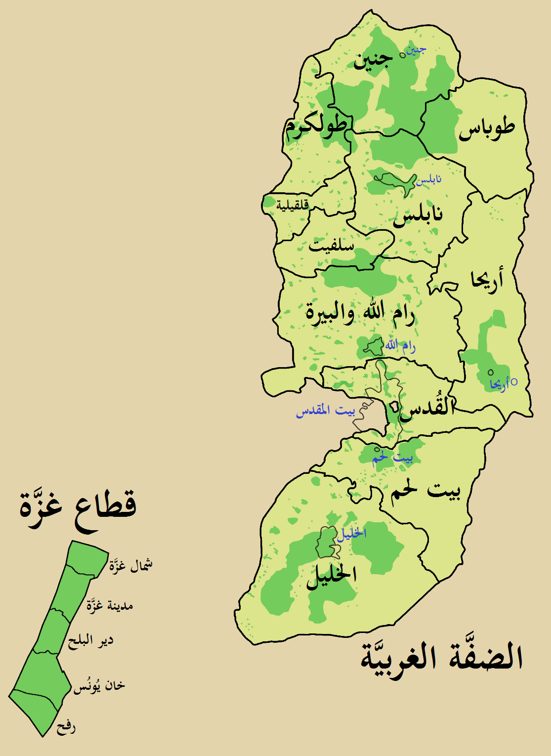 خريطة تُظهر الدوائر الانتخابيَّة في الأراضي الفلسطينيَّة سنة 2006م. حُدُود الدوائر مرسومة بالخط الأسود الثخين، أمَّا الخُطُوط الأنحف فهي تُظهر حُدُود المُدن، وعُلِّمت أسماء المُدن بِاللون الأزرق. اللون الأخضر يرمز إلى المناطق الخاضعة لِسيادة السُلطة الفلسطينيَّة.